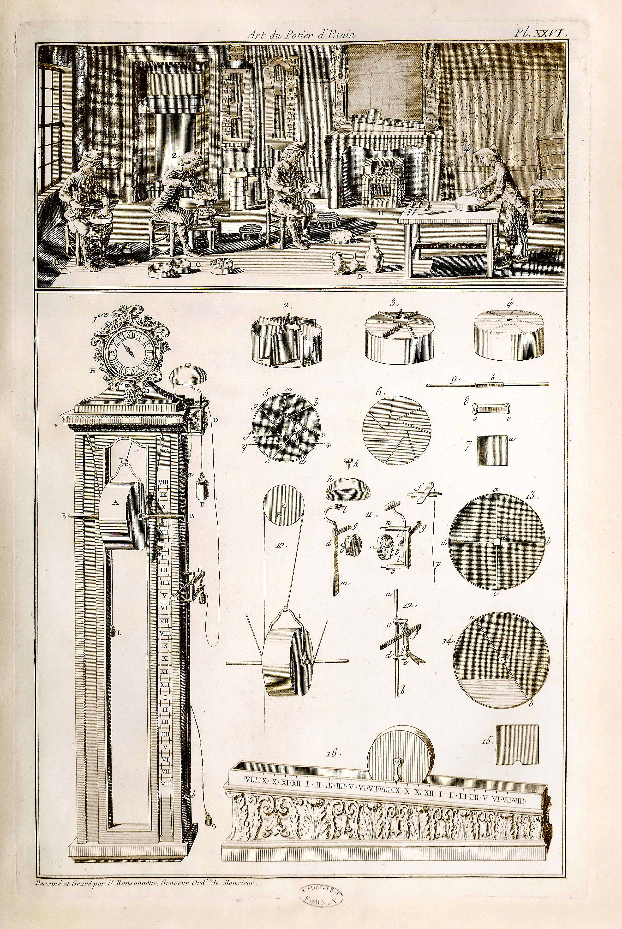 Un atelier d'assemblage et de finition d'horloges à eau avec tambour moulé. Détails divers. On peut remarquer les locaux soignés dans la vignette